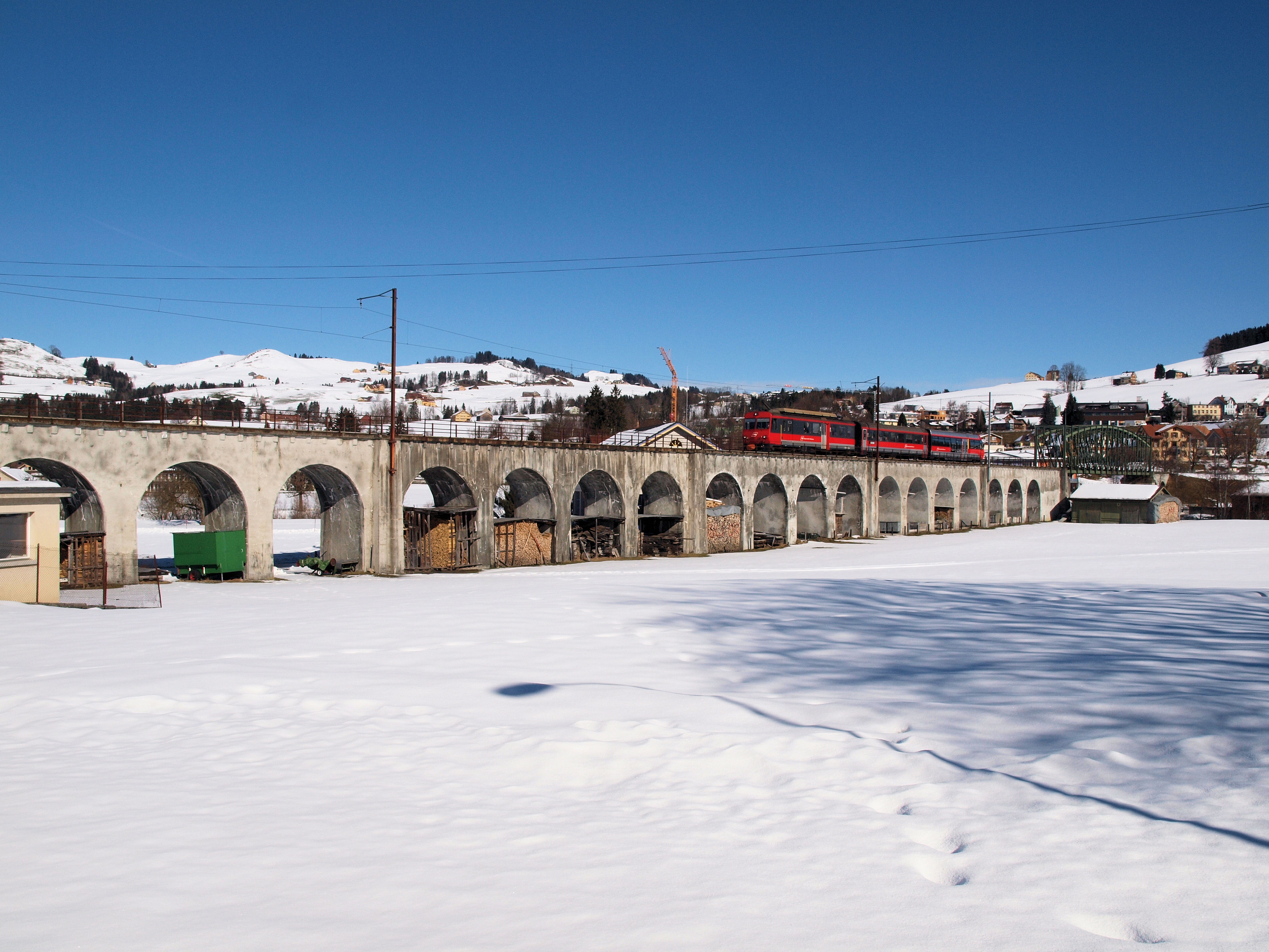 Das Sitterviadukt der Bahnstrecke Appenzell-Gais